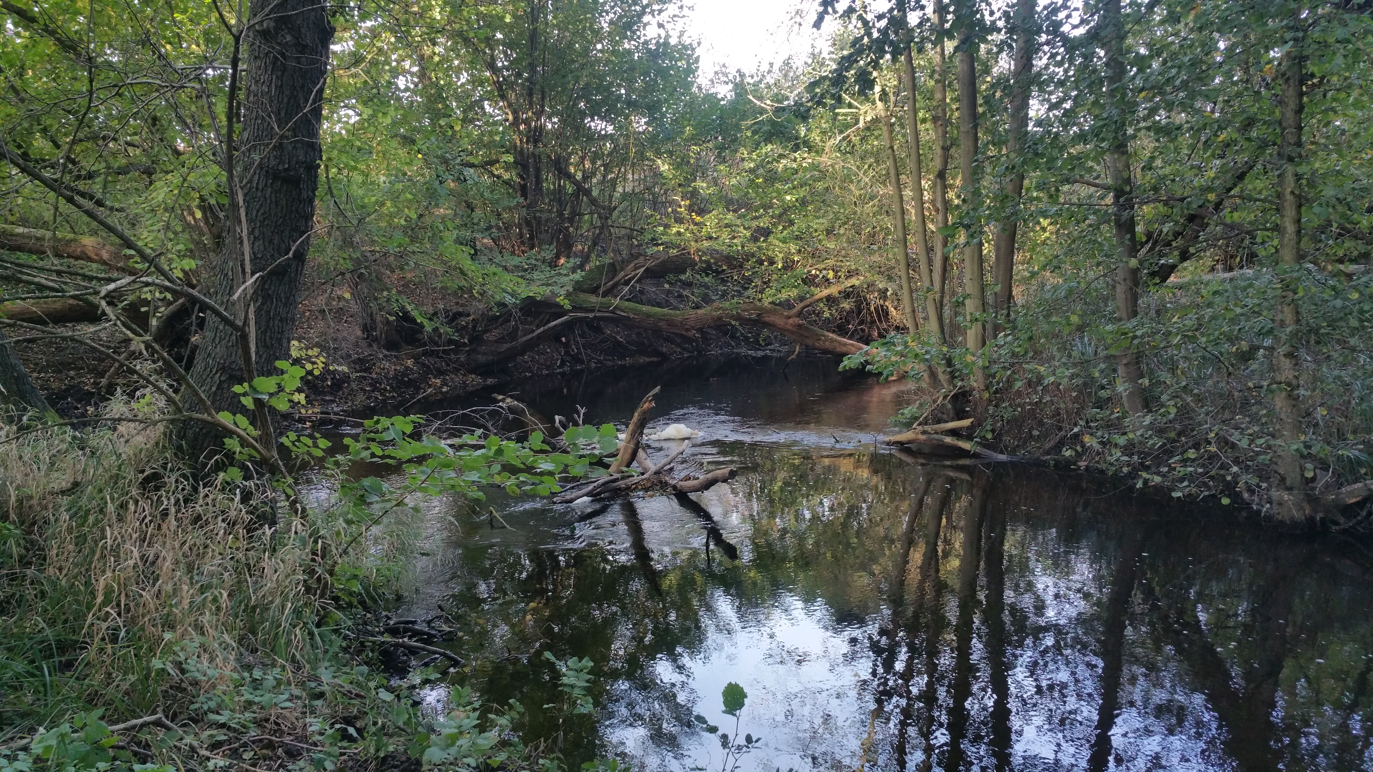 Leśne zakole Tywy poniżej miejscowości Osuch, w okolicach Mielenka Gryfińskiego.